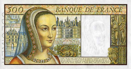 500 frankos francia bankjegyterv hátoldala, Bretagne-i Anna (1477-1514) portréjával. Mérete: 183 X 98 mm.